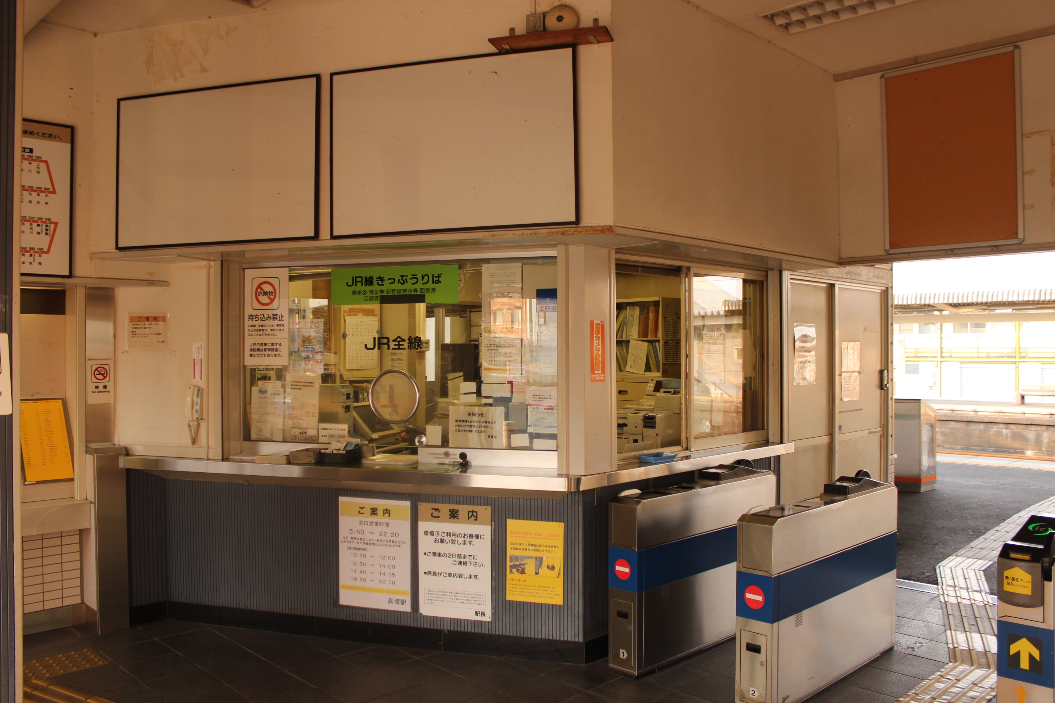 高塚駅旧駅舎改札